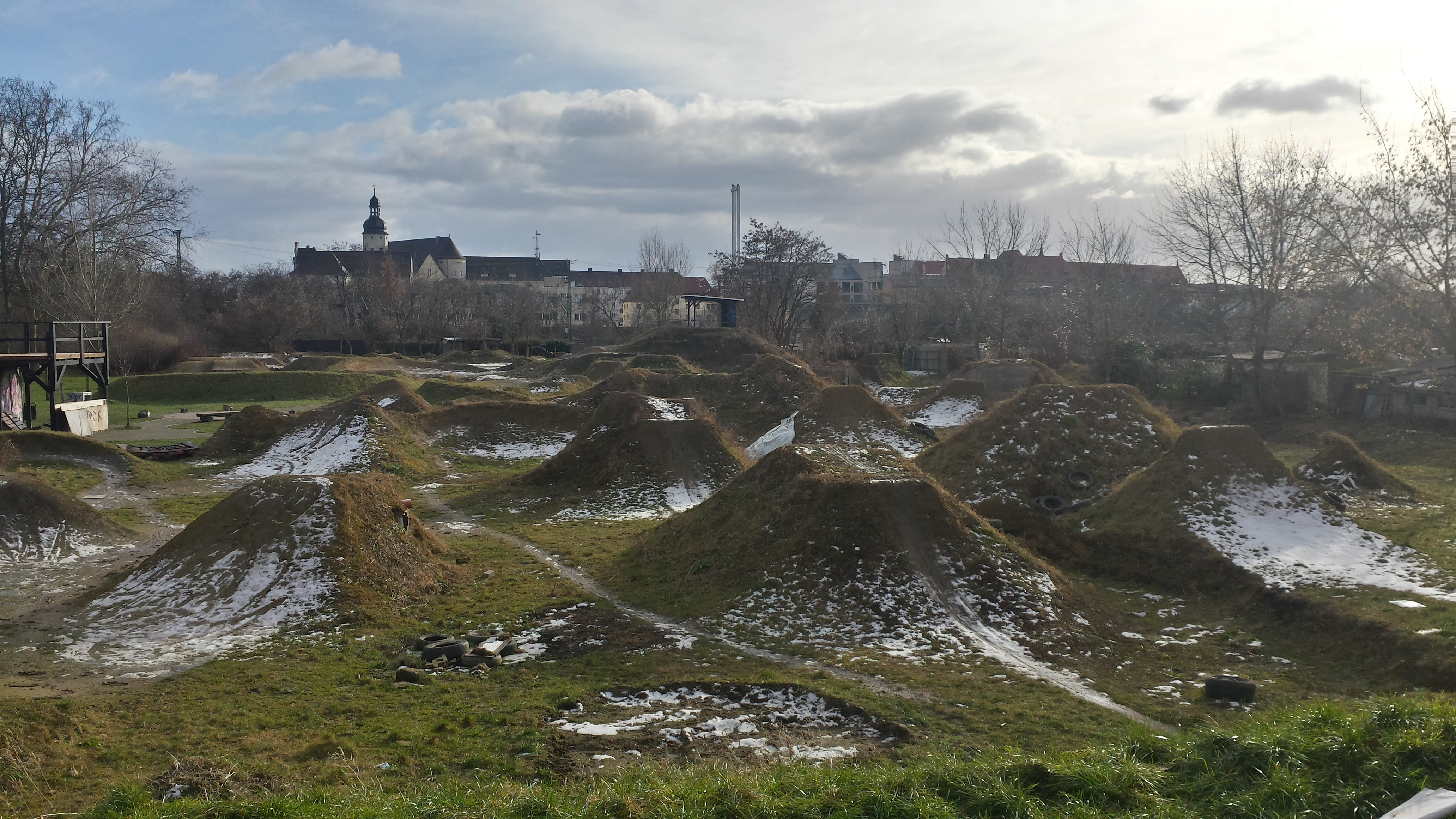 Dirtpark M-Trails in Magdeburg (Maybachstraße)